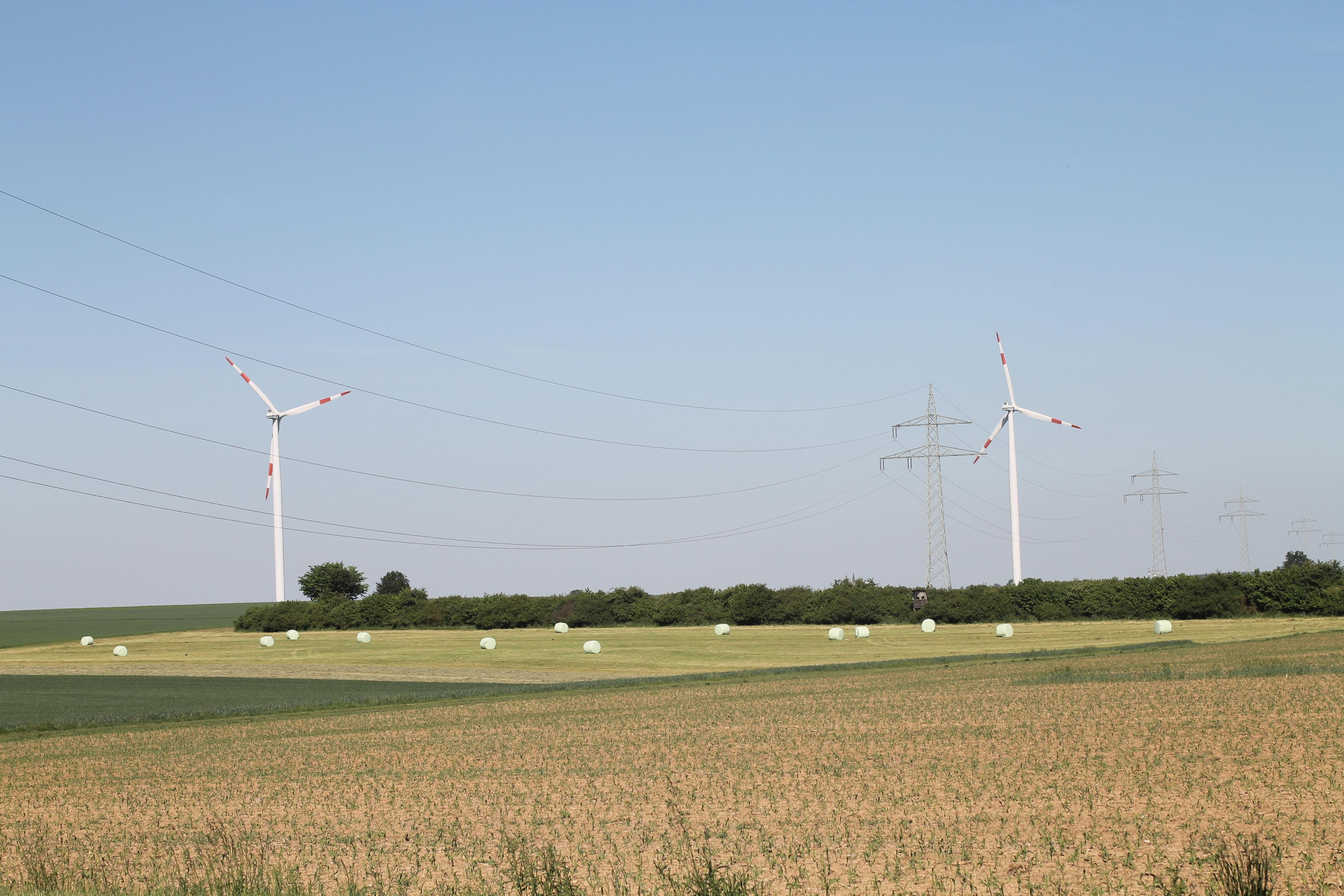 Windräder an der Keltischen Schanze